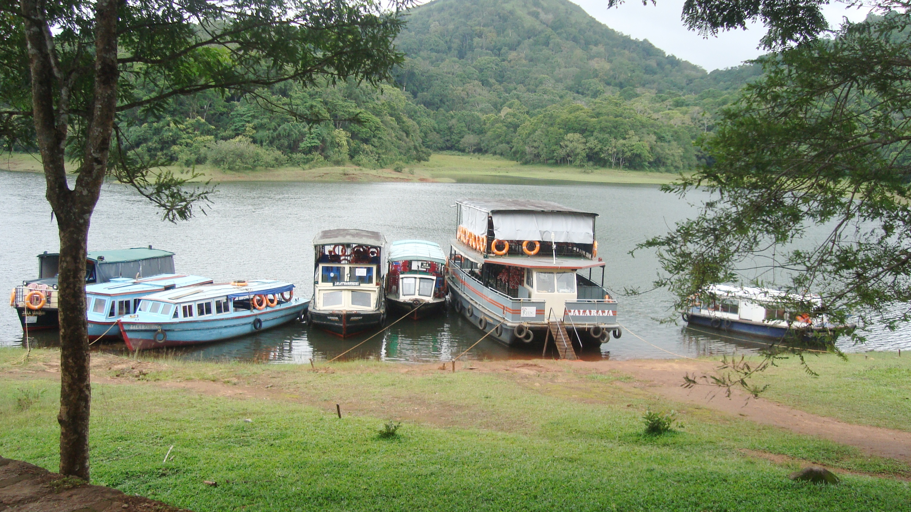 தேக்கடி படகுத்துறை